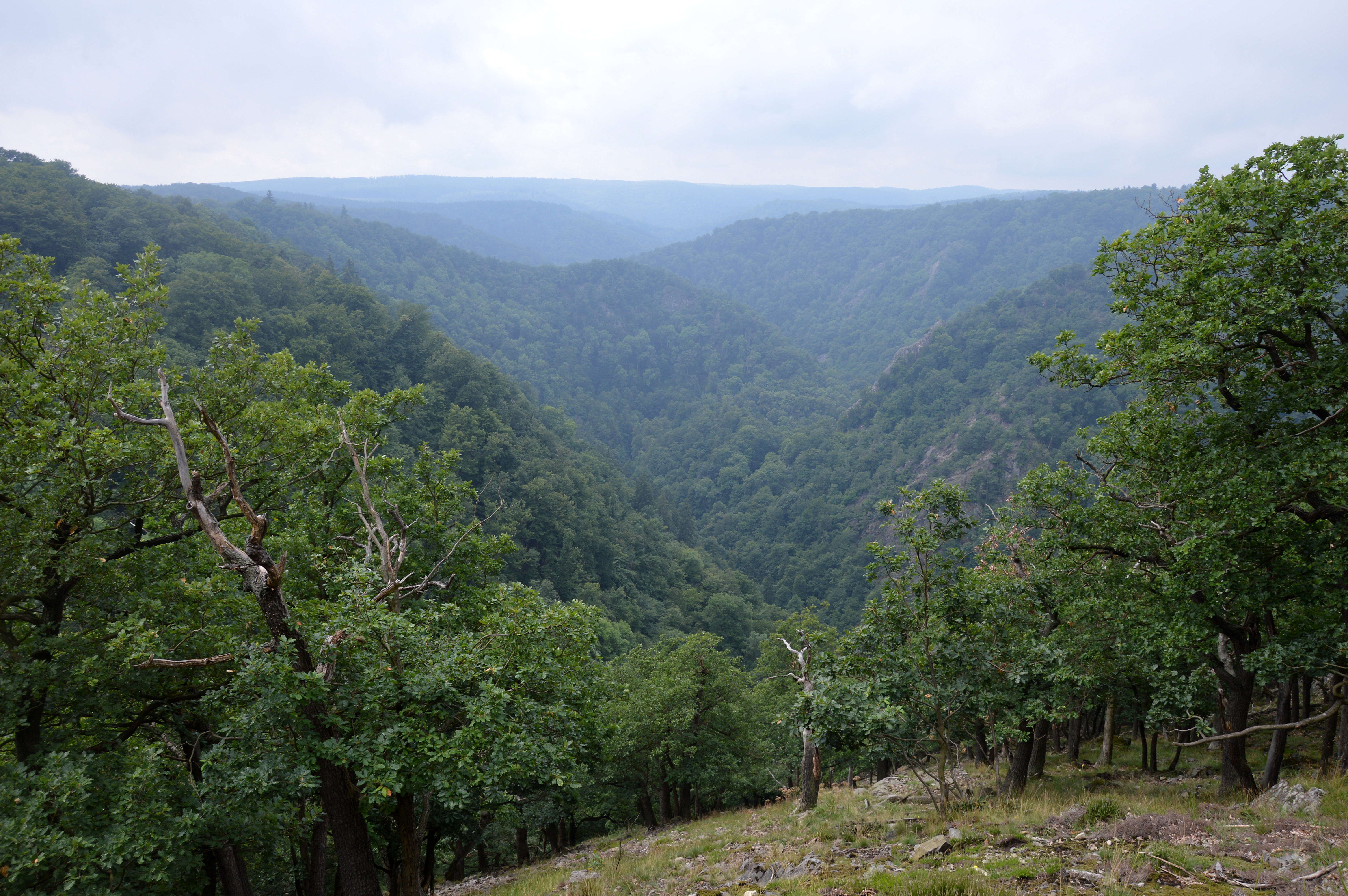 Blick vom Bodetalblick